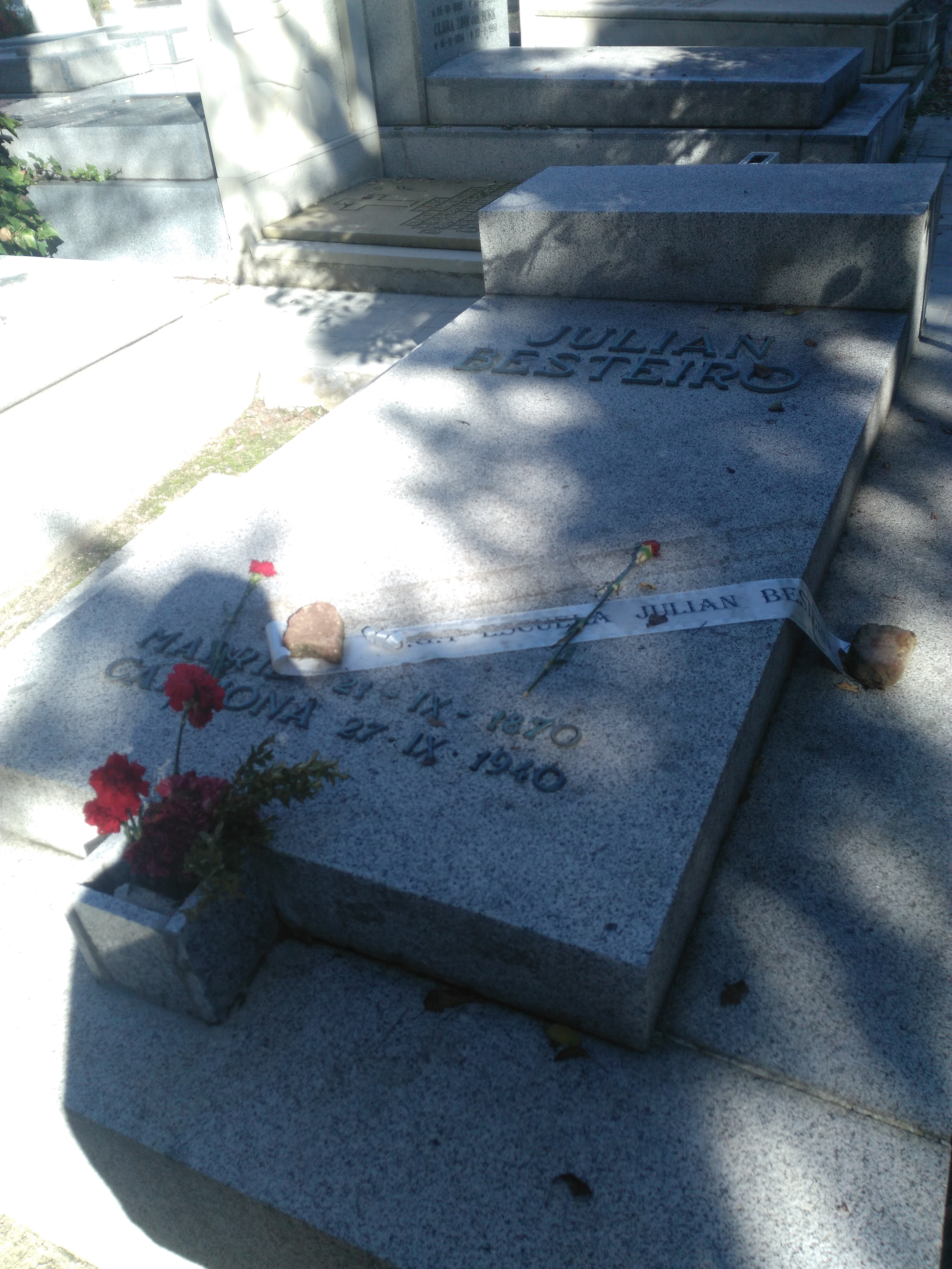 Tumba de Julián Besteiro, en el cementerio civil de Madrid.